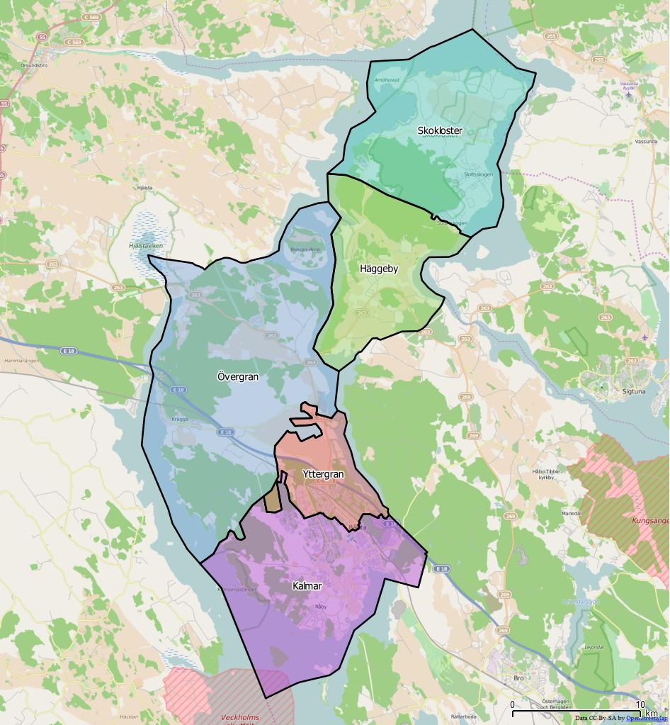 Distriktsindelningen i Håbo kommun